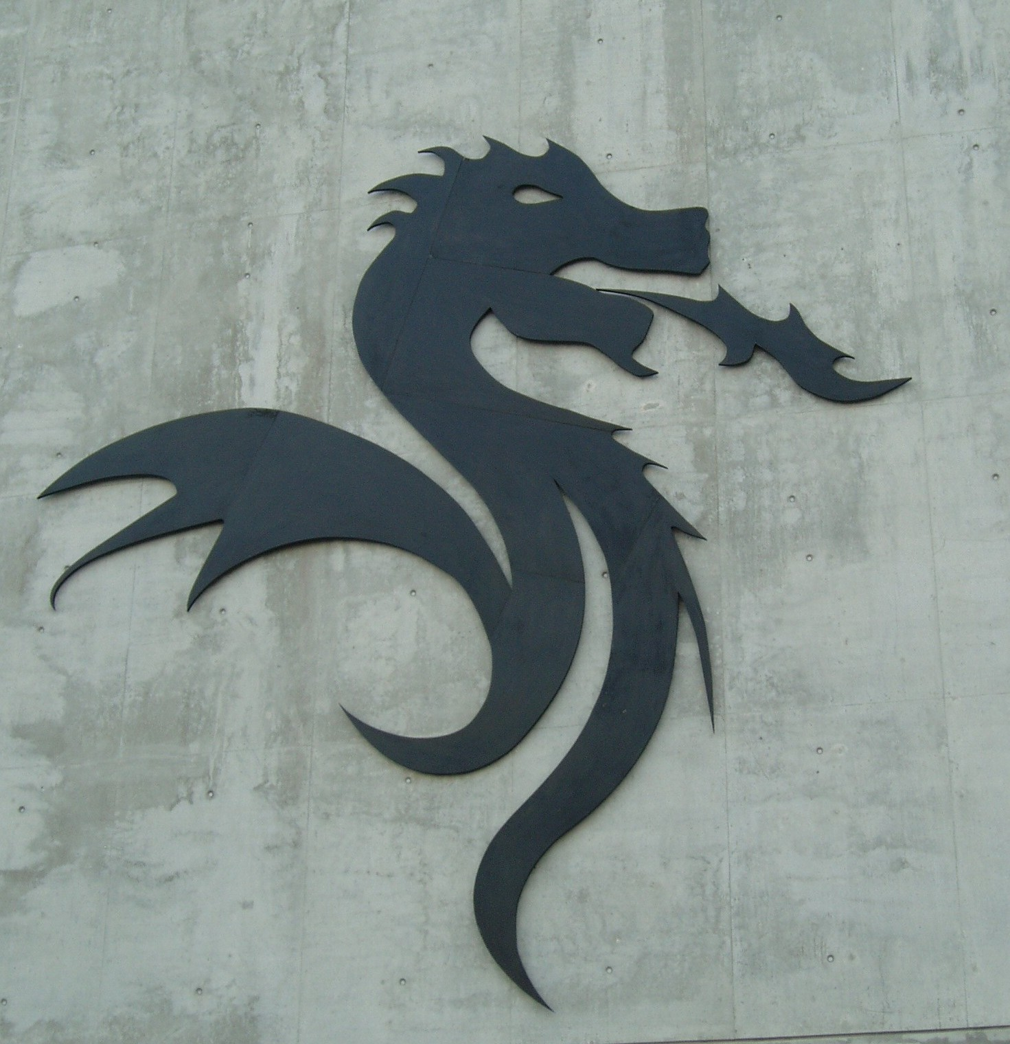 Drachen-Emblem an der Ostseite des Stadions